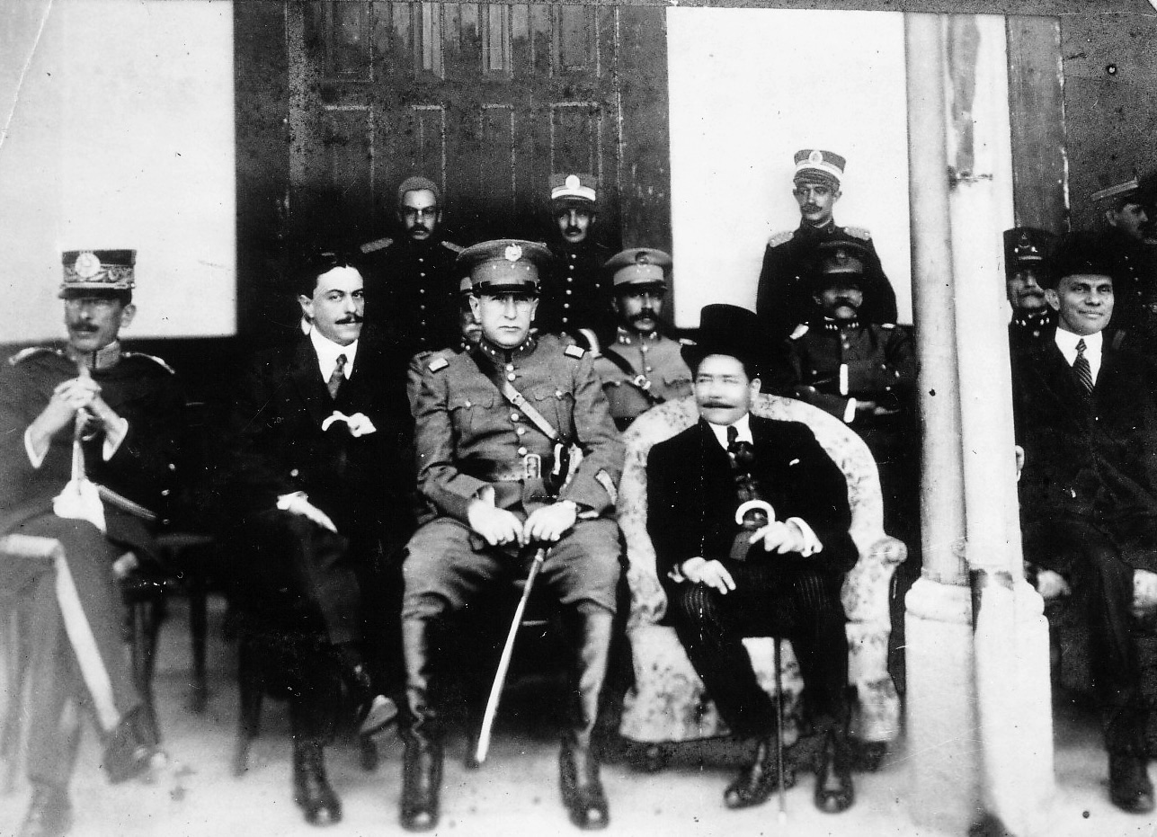 Presidente Jorge Ubico con algunos de sus colaboradores.